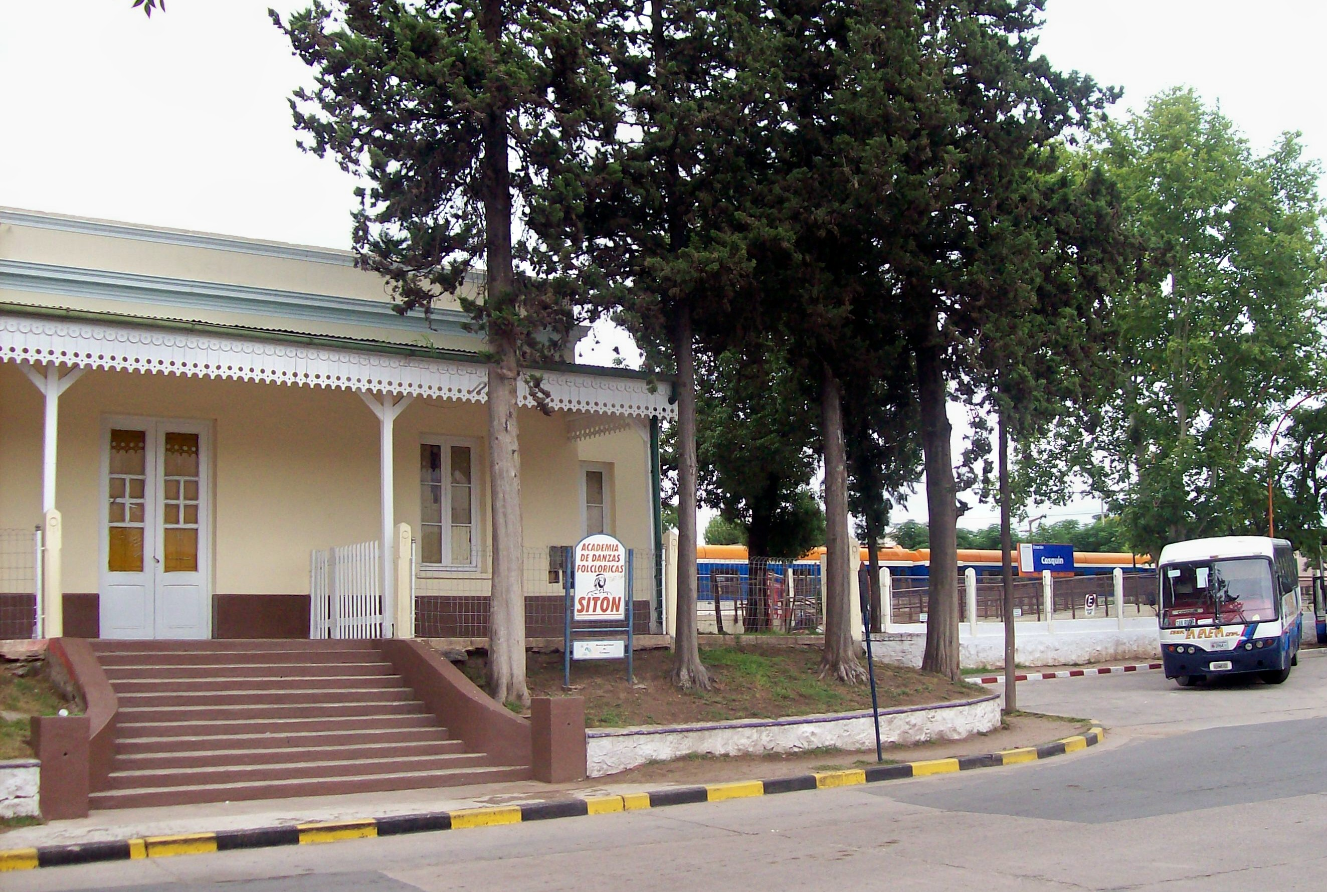 Estación Edificio policial, calle Obispo Bustos, en la ciudad de Cosquín, provincia de Córdoba, Argentina. Tomado desde San Martín y Sarmiento. (esquina Jaime Dávalos)